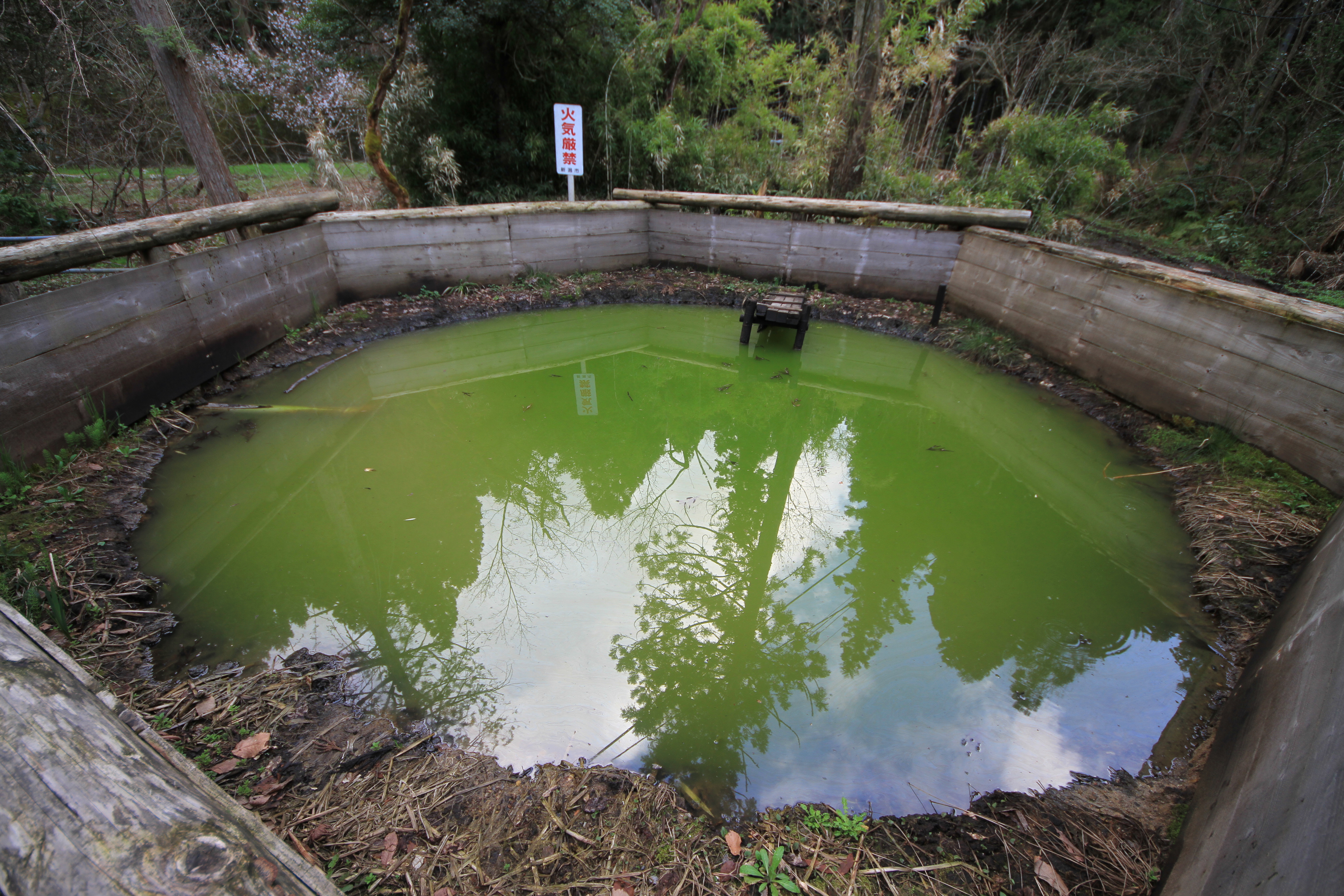 2 Chome-10 Kusouzuchō, Akiha-ku, Niigata-shi, Niigata-ken 956-0833, Japan